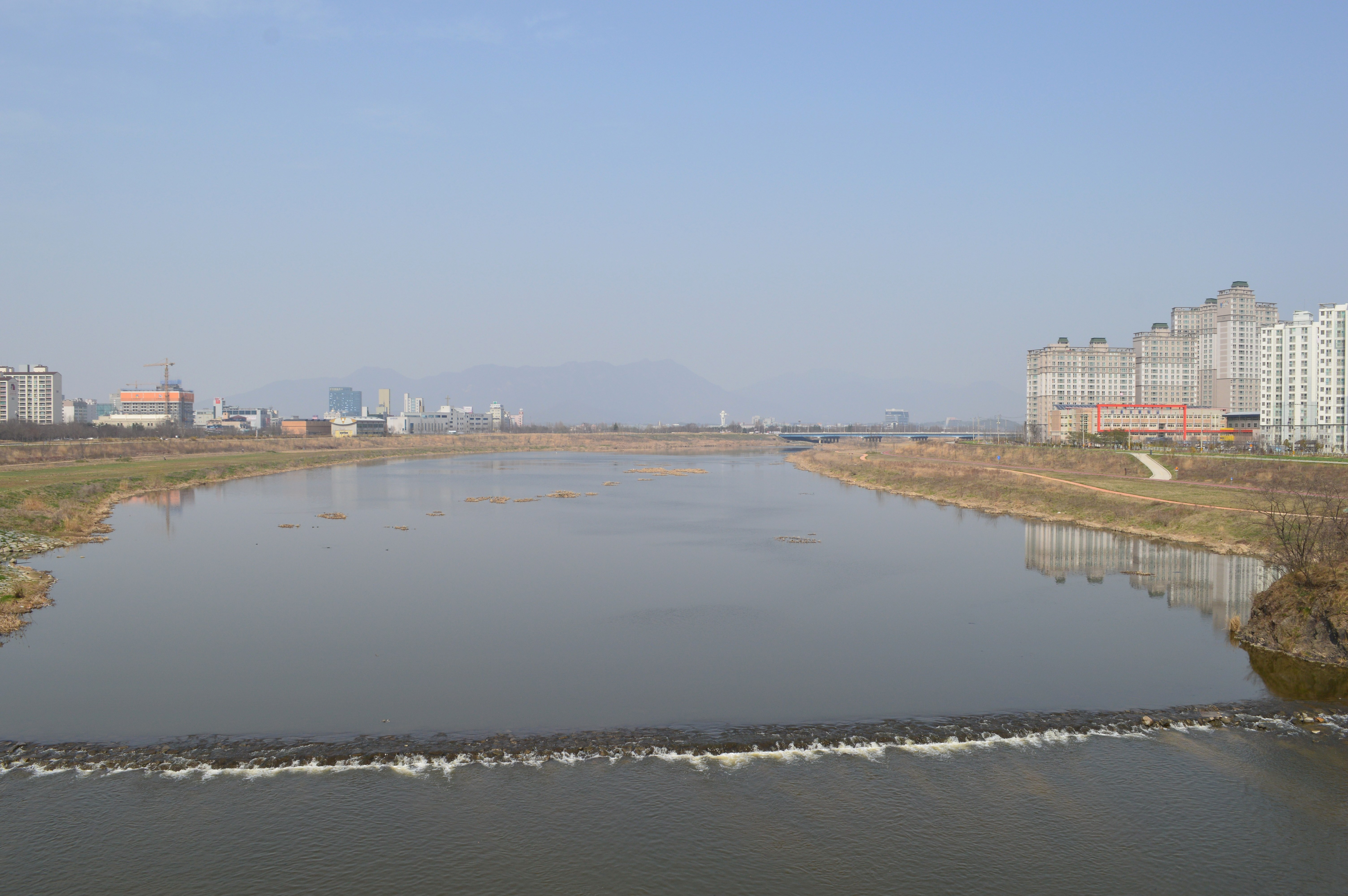 栄山江 光州広域市流域